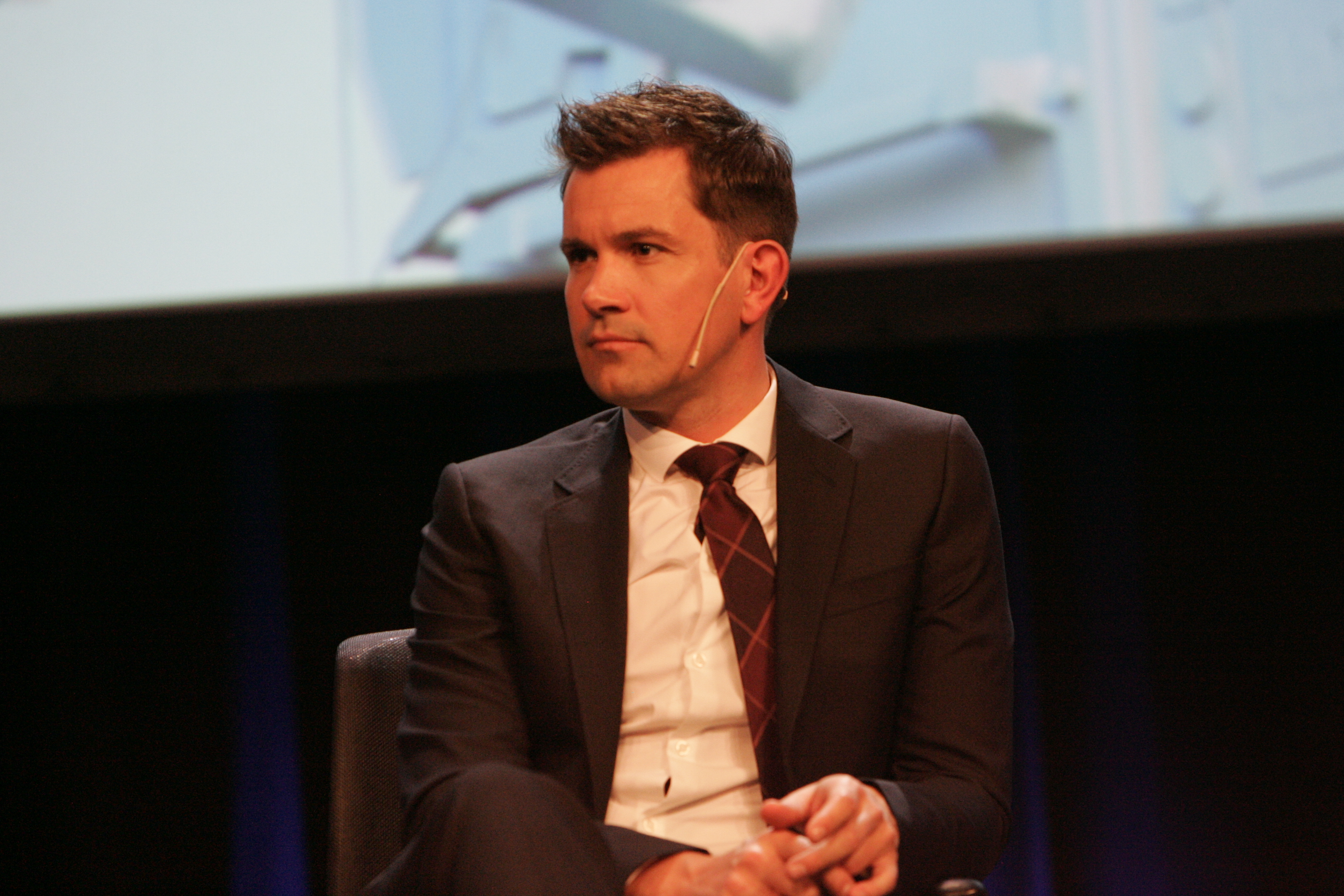 Aleksander Herresthal